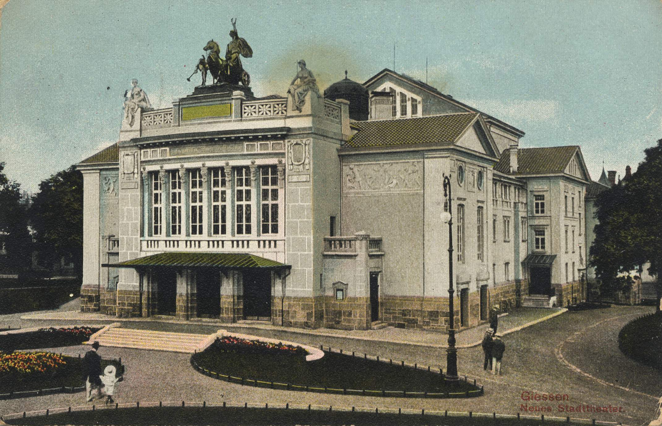 Stadttheater, Gießen, Germany